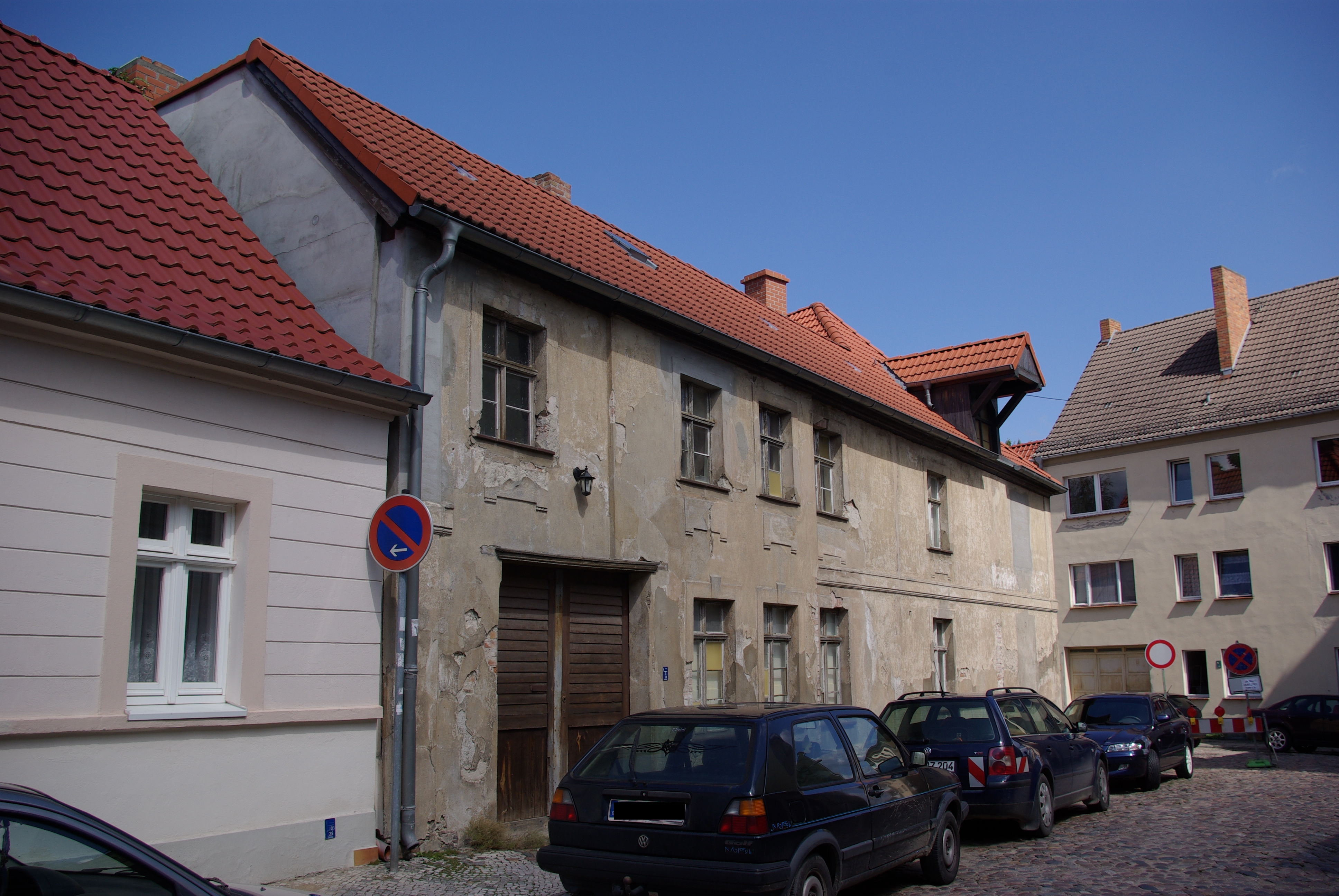 Bad Freienwalde / Oder in Brandenburg. Das Haus in der Bergstraße 2 steht unter Denkmalschutz.